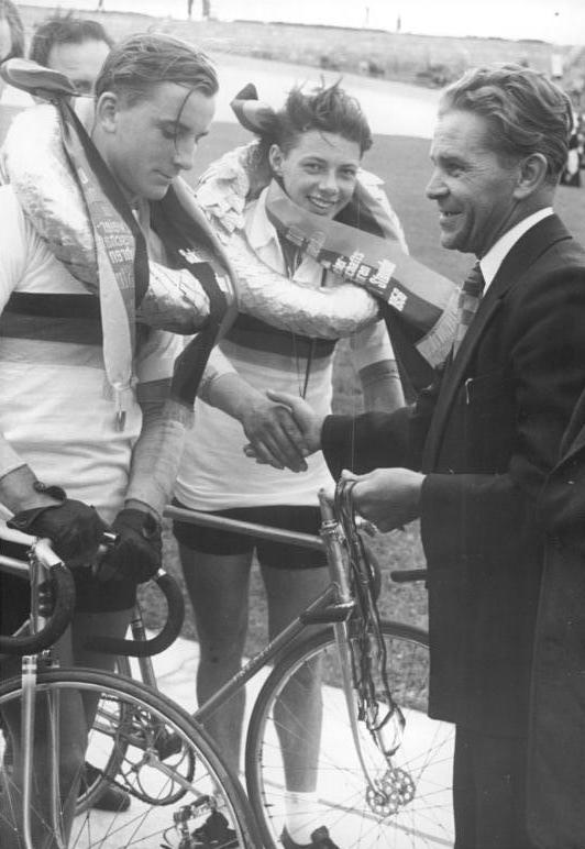 Uhlig, Graf, Werner Scharch Zentralbild Wendorf 23.7.1956 DDR-Meisterschaften der Bahnfahrer in Berlin-Weissensee Vom 22.7. bis 28.7.1956 finden auf der Radrennbahn in Berlin-Weissensee die Meisterschaften der Deutschen Demokratischen Republik im Bahnfahren statt. Zum ersten Male haben die Radsportfreunde damit Gelegenheit, die Bahnmeisterschaften in Berlin mitzuerleben. UBz: Der Präsident der Sektion Radsport der DDR Werner Scharch zeichnet die neuen Meister im Zweier-Mannschaftsfahren der Jugend Uhlig (links) und Graf (Mitte) aus.